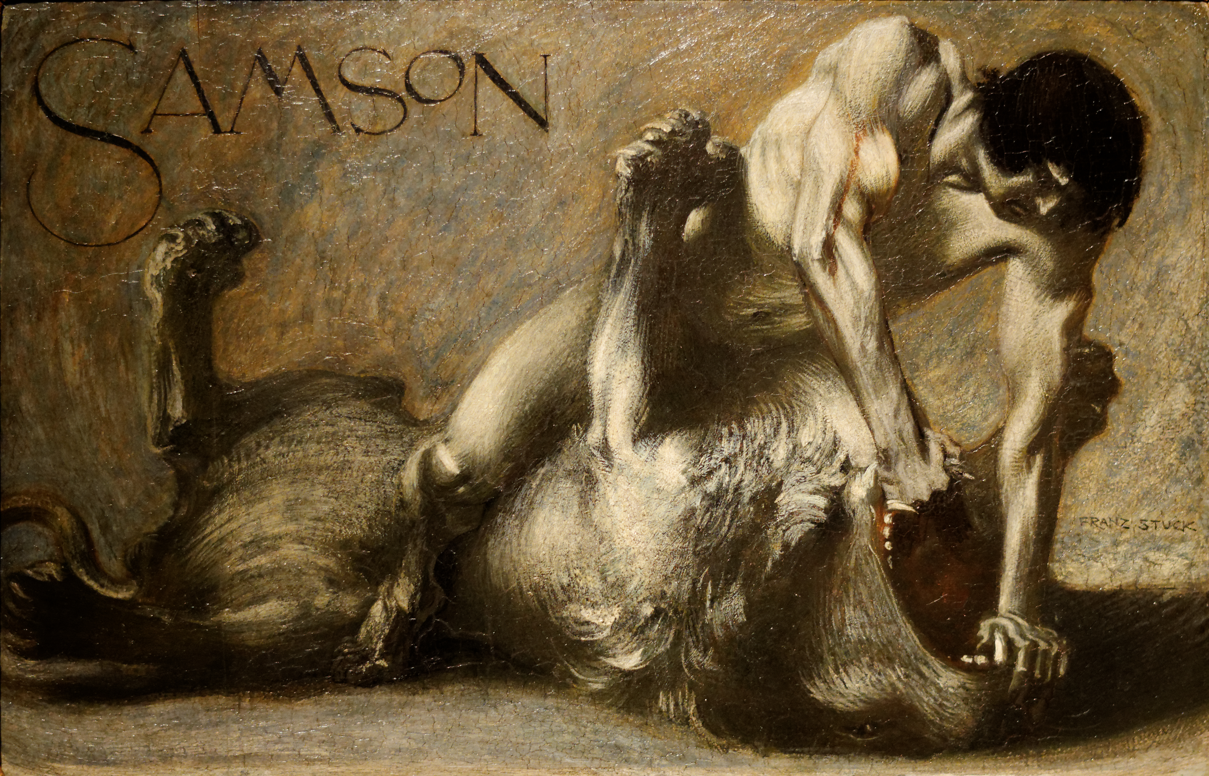 Samson. Huile sur bois de Franz von Stuck, 1891. Exposée au Museum Villa Stuck, Munich